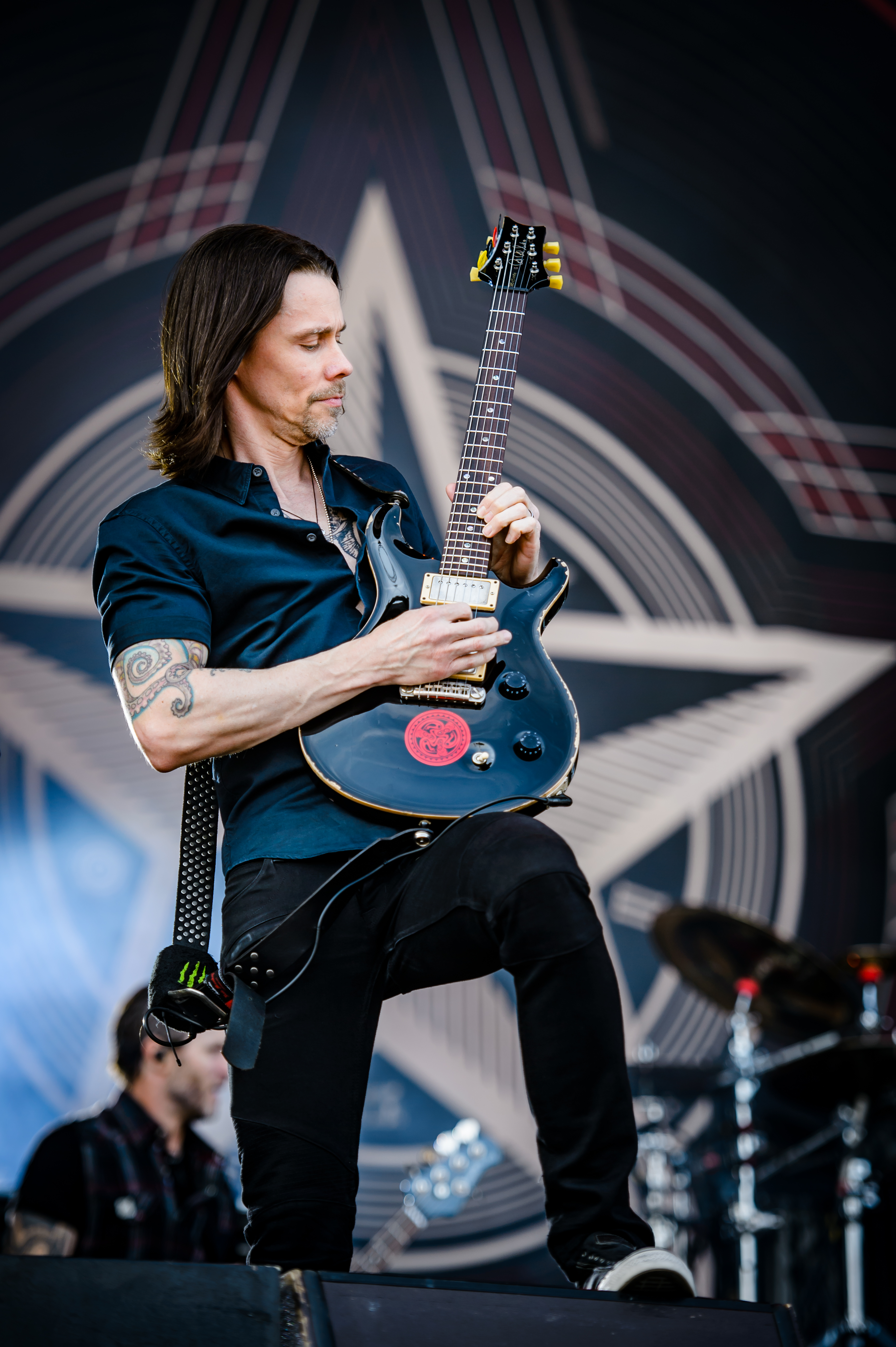 'Rock im Park 2017; Nürnberg': 'Alter Bridge'